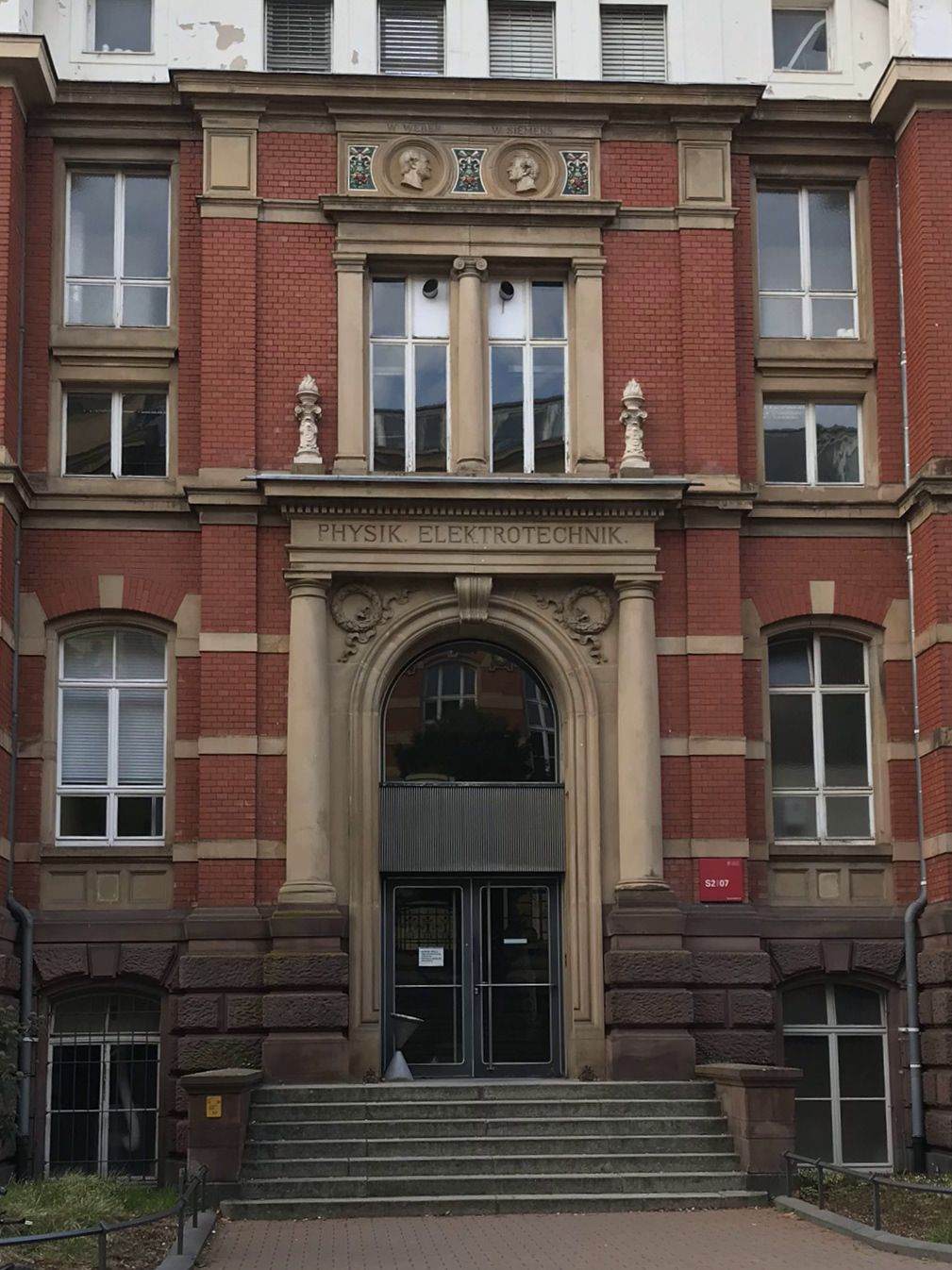 Portal der Physik und Elektrotechnik der TH Darmstadt, Wirkungsstätte von Otto Scherzer.